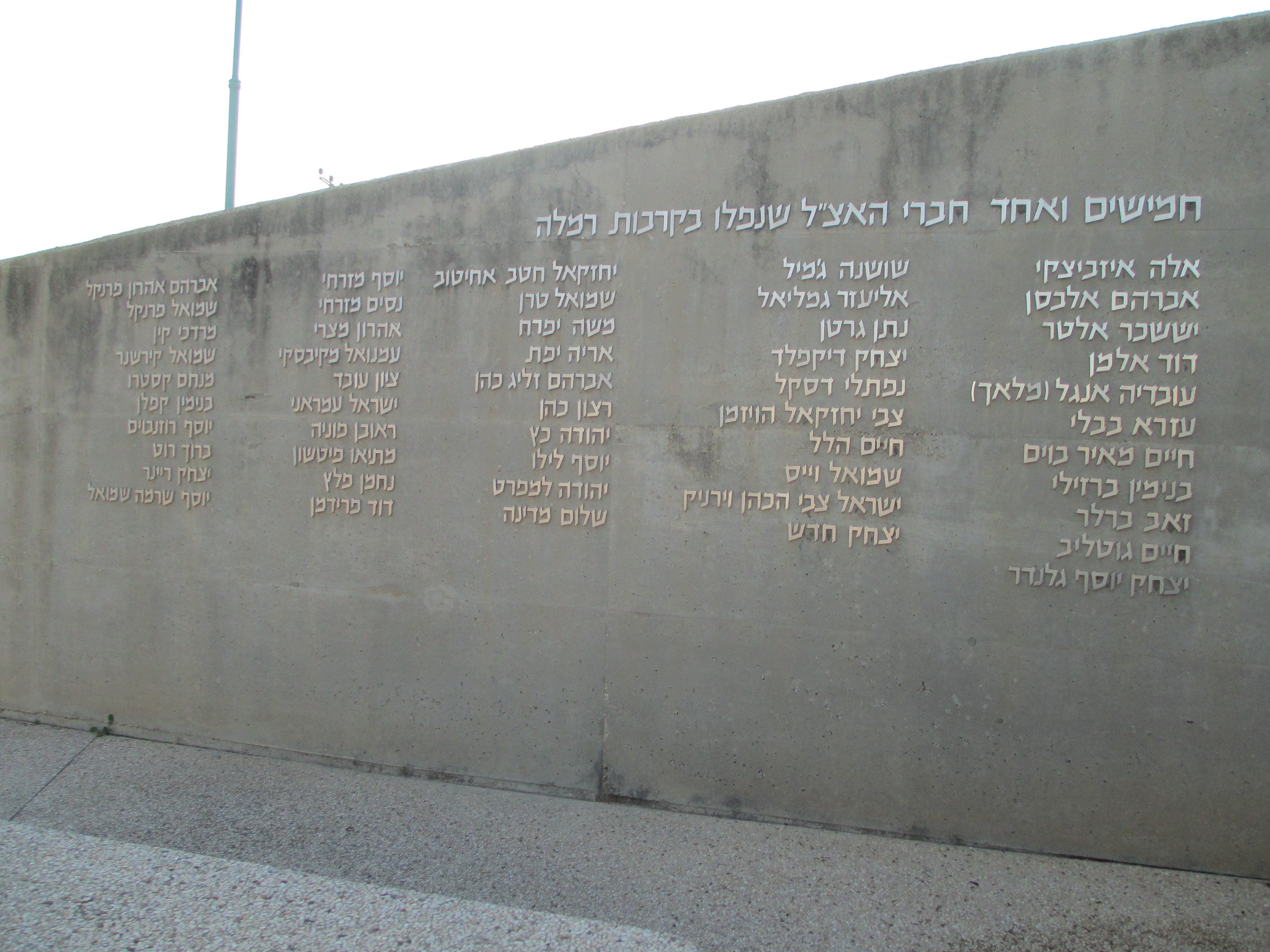 שמות הנופלים באנדרטת אצ"ל ברמלה